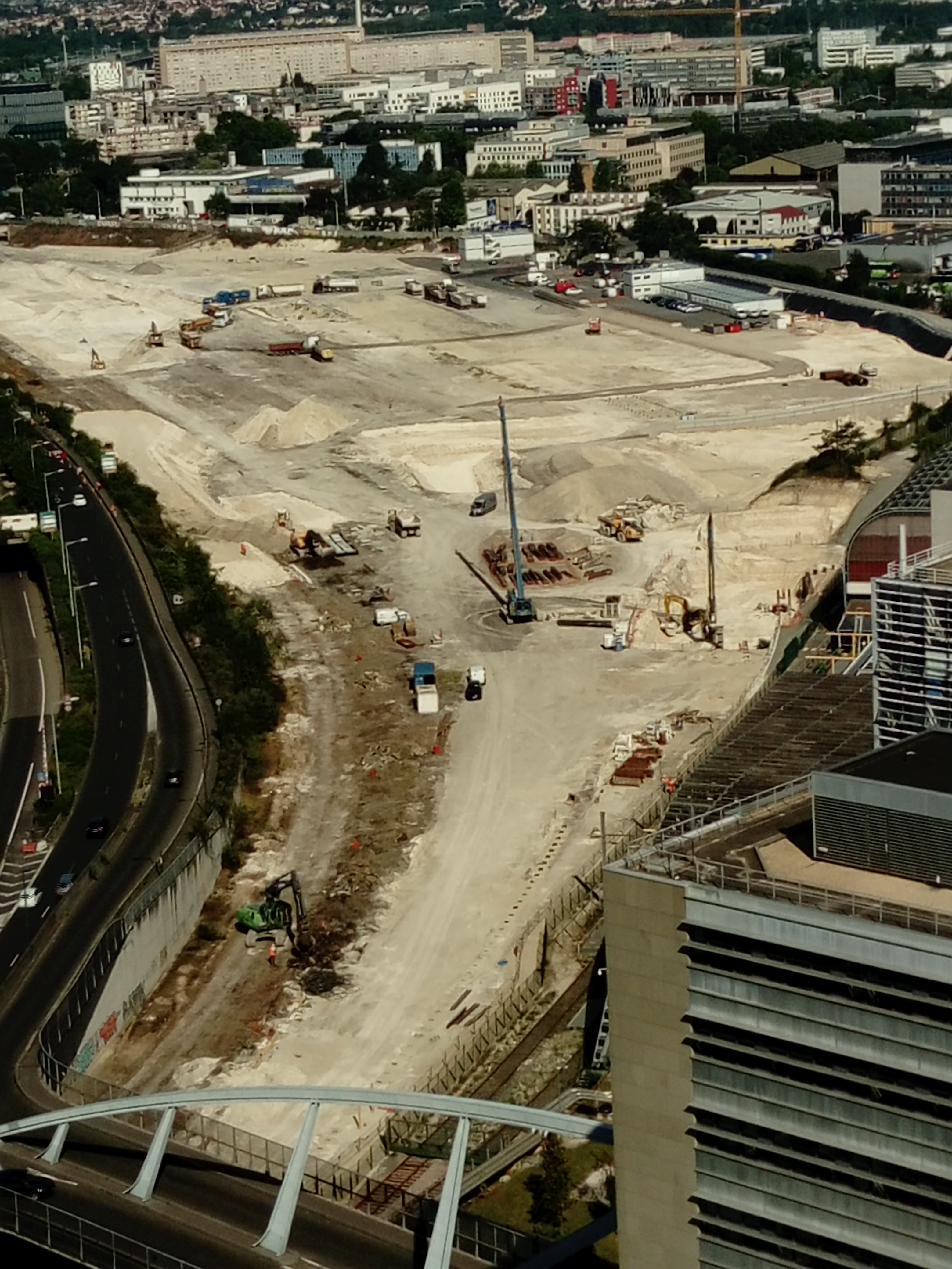 Vue du chantier de la gare de Nanterre-La Folie, Hauts-de-Seine, France, à la fin mai 2017.